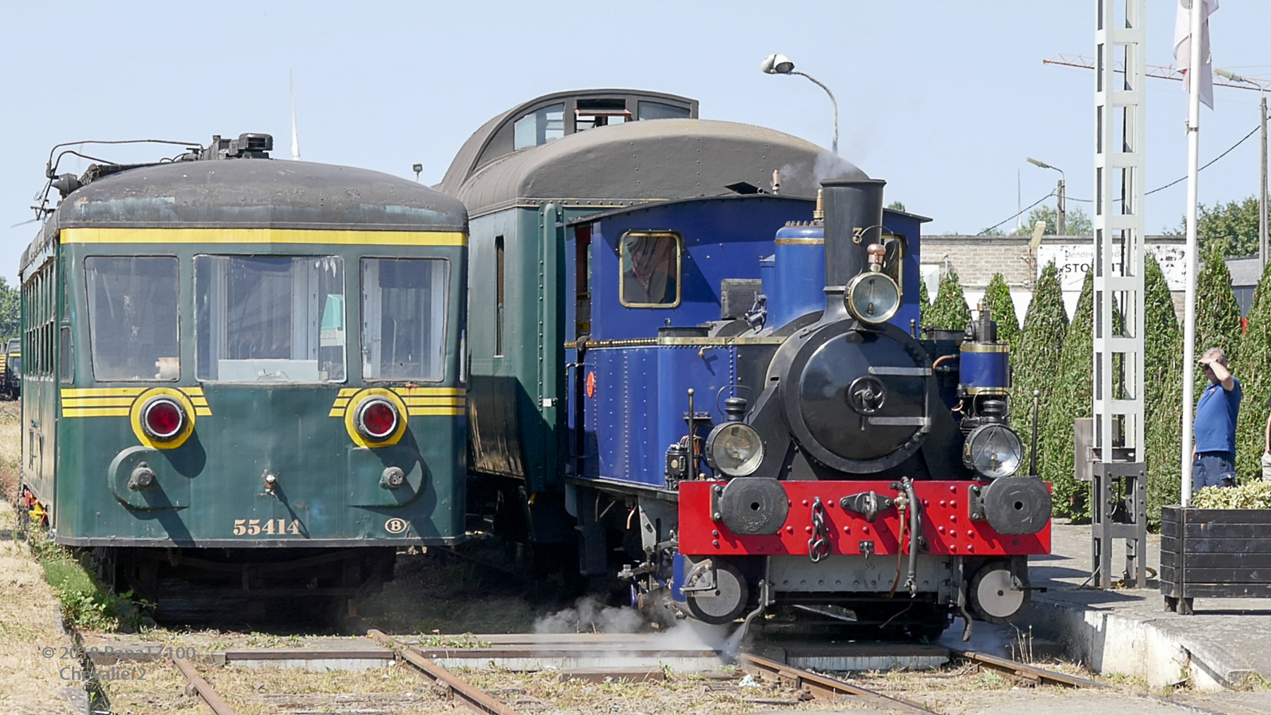 Festival 2018 Baasrode-Puurs